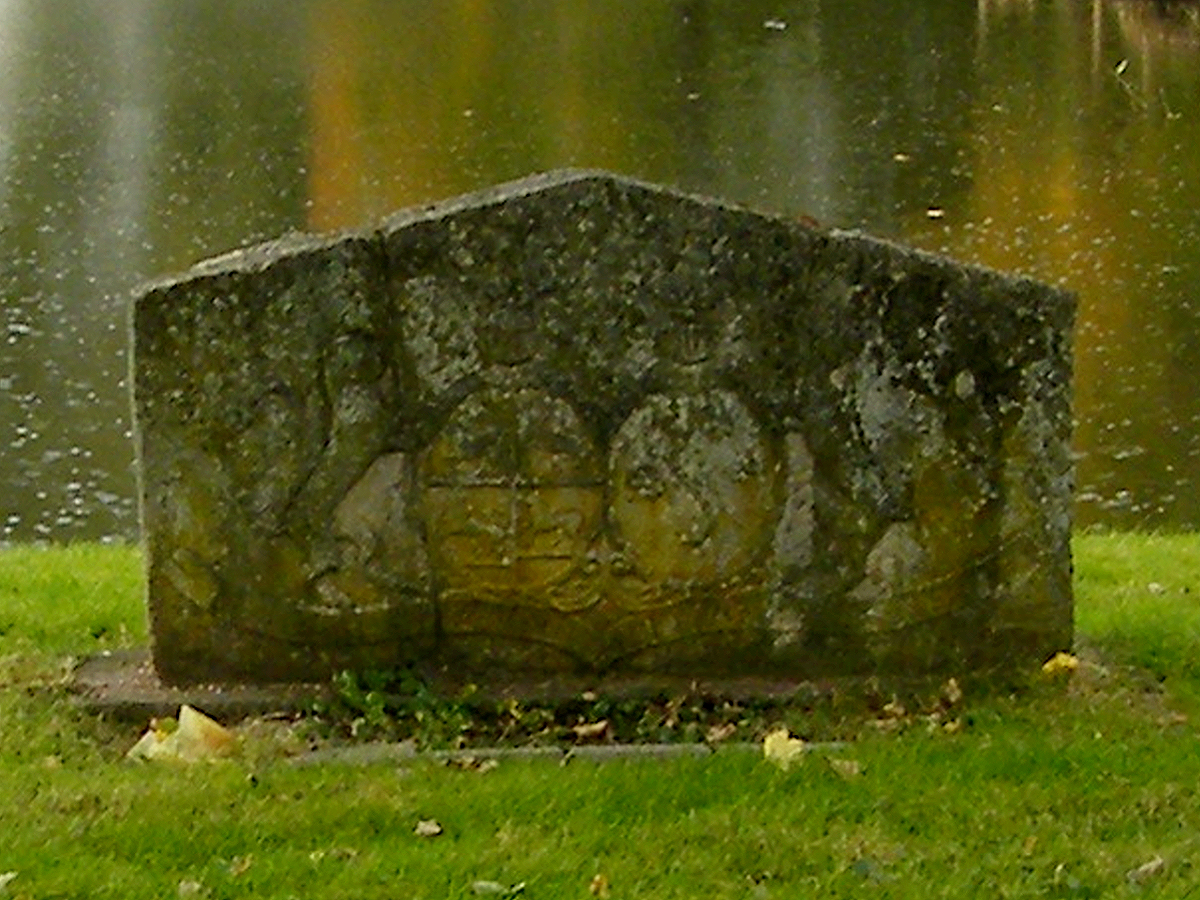 Wappenstein der ehem. Wasserburg in Waldeck-Höringhausen (Stein stammt aus dem 1971 abgebrochenen Torbogen des zur Burg gehörenden Gutshofes. (Wappen der Wöllfe von Gudenberg) und dem Adelsgeschlecht von Schachten